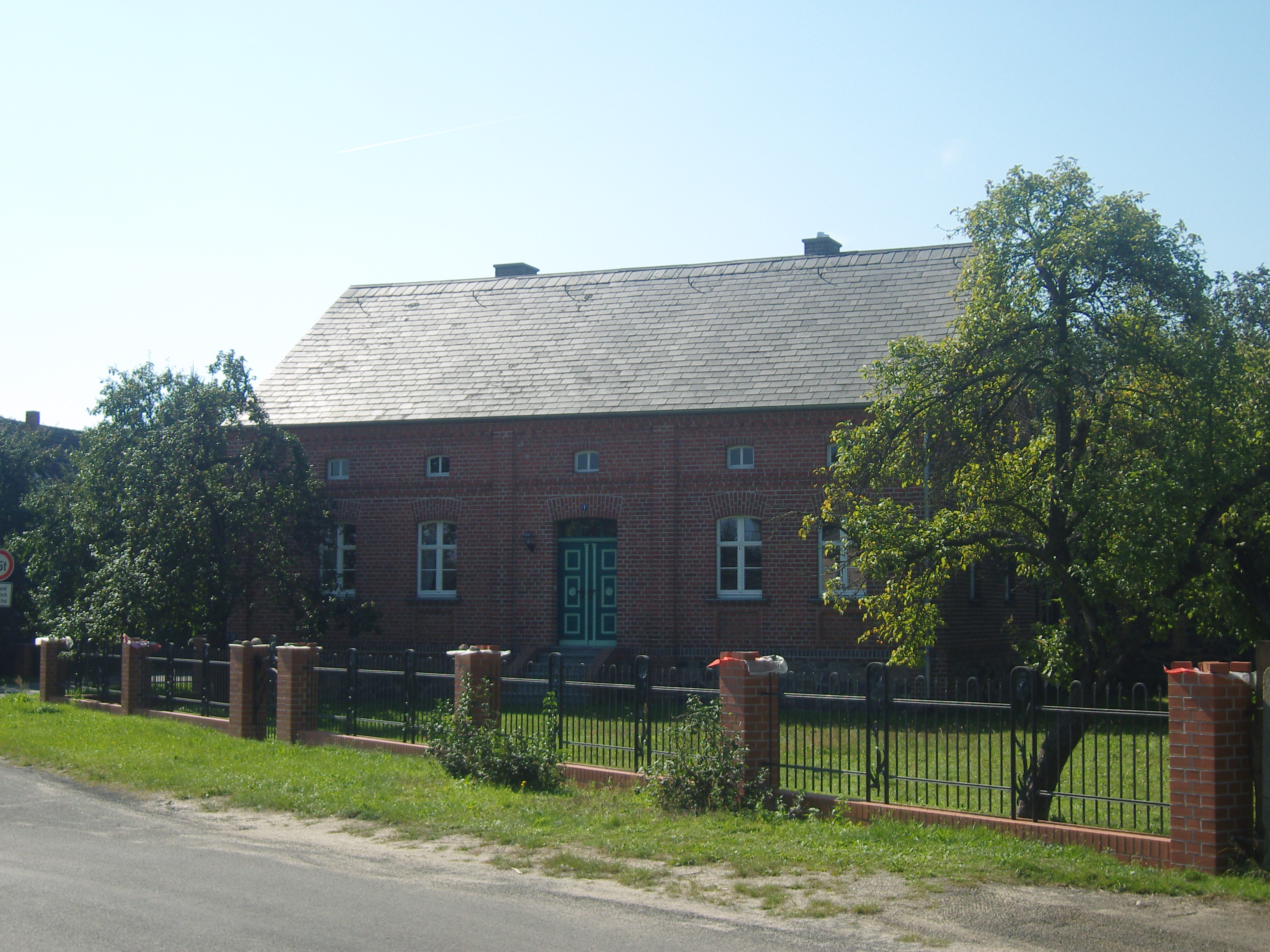 Haus Dorfanger 1 in Rutzkau, Gemeinde Bronkow